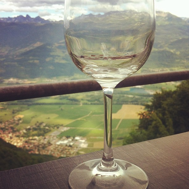 AOC Abymes